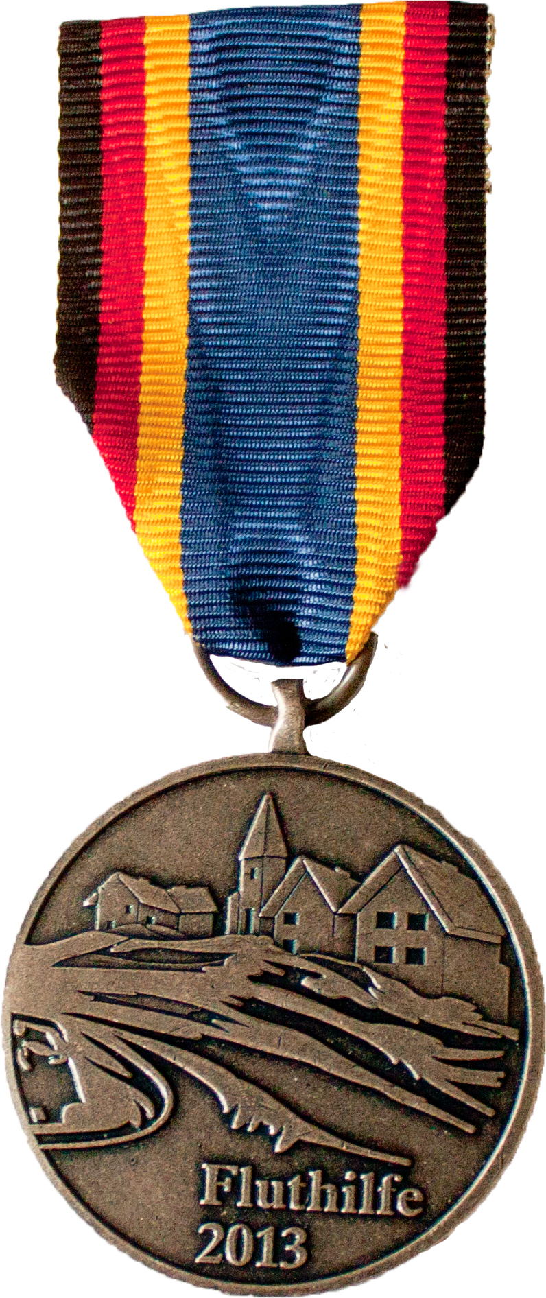 Einsatzmedallie Fluthilfe 2013 Front